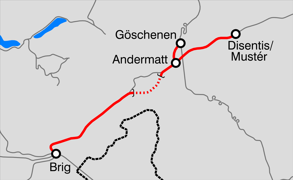 Mappa della rete FO.